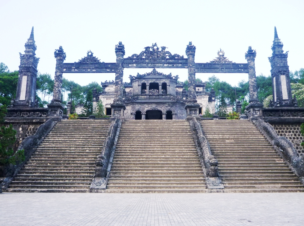 Thể Loại:Di tích cố đô Huế Thể loại:Lăng tẩm các Vua chúa Nguyễn Thể loại:Di tích ngoài Kinh Thành Huế